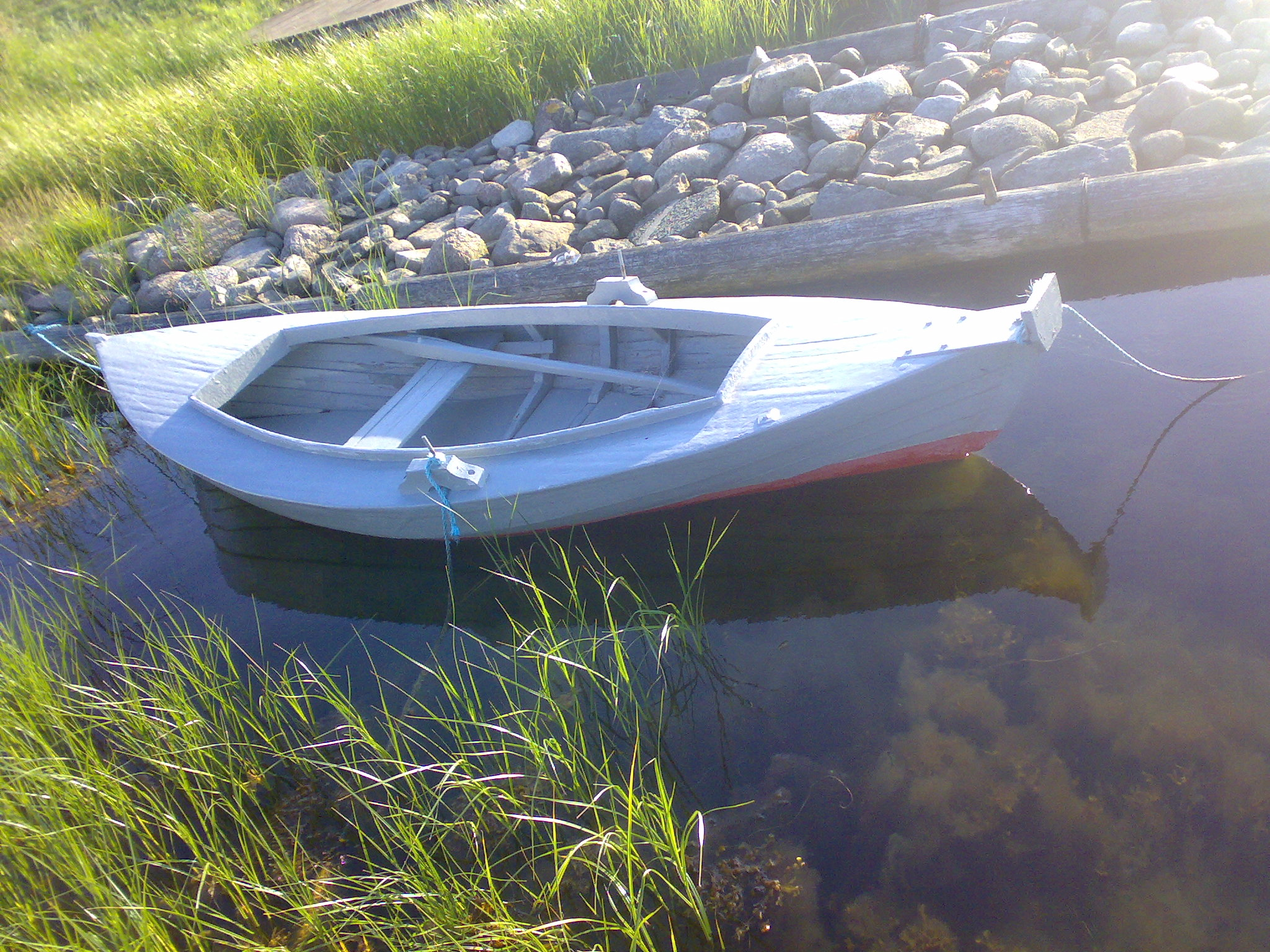 Pram (boat) at Hasslö, Sweden